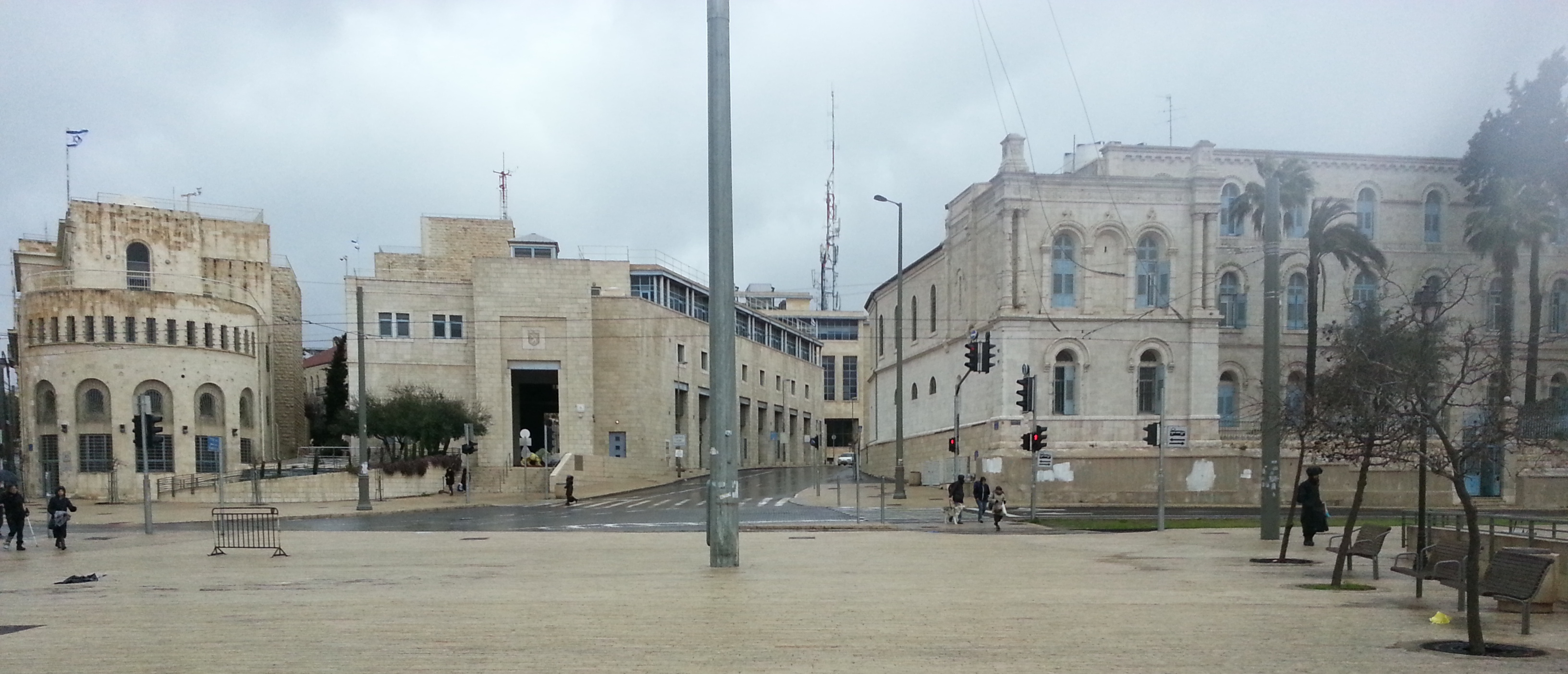 כיכר צה"ל בירושלים ביום חורף